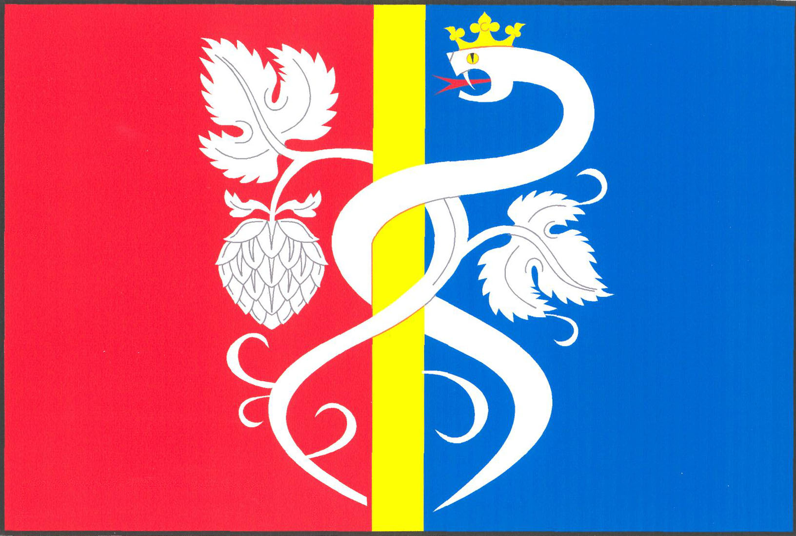 Vlajka obce Očihov